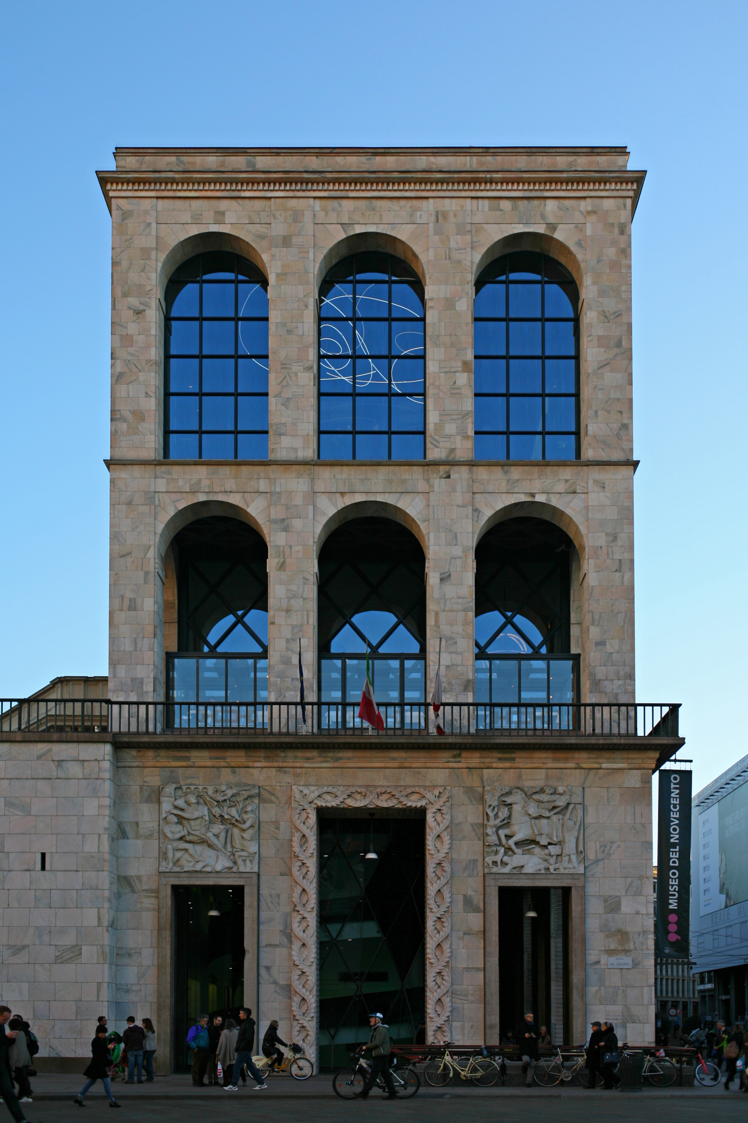 Museo del Novecento, Milano, lato piazza del Duomo